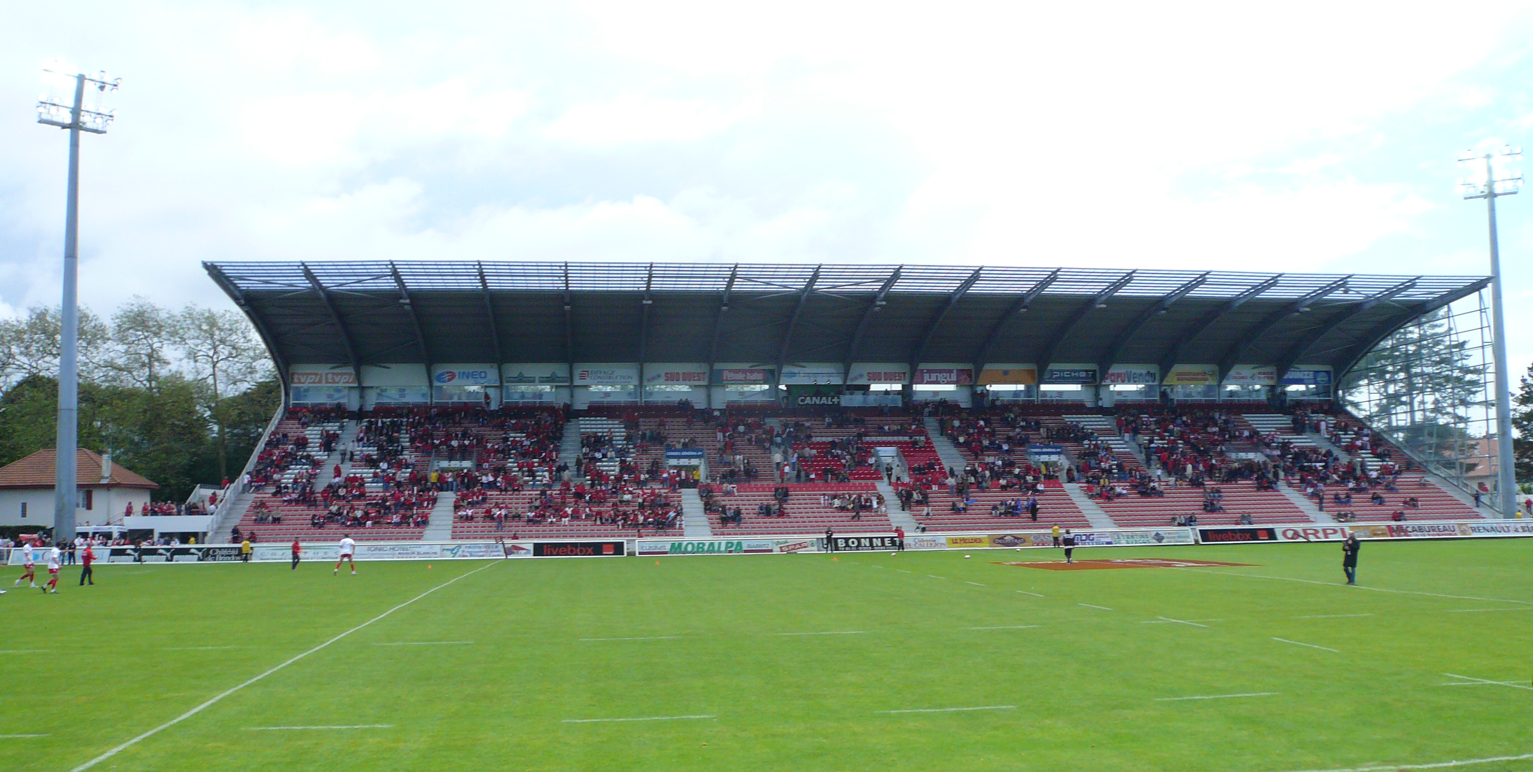 Parc des Sports d'Aguiléra en 2008